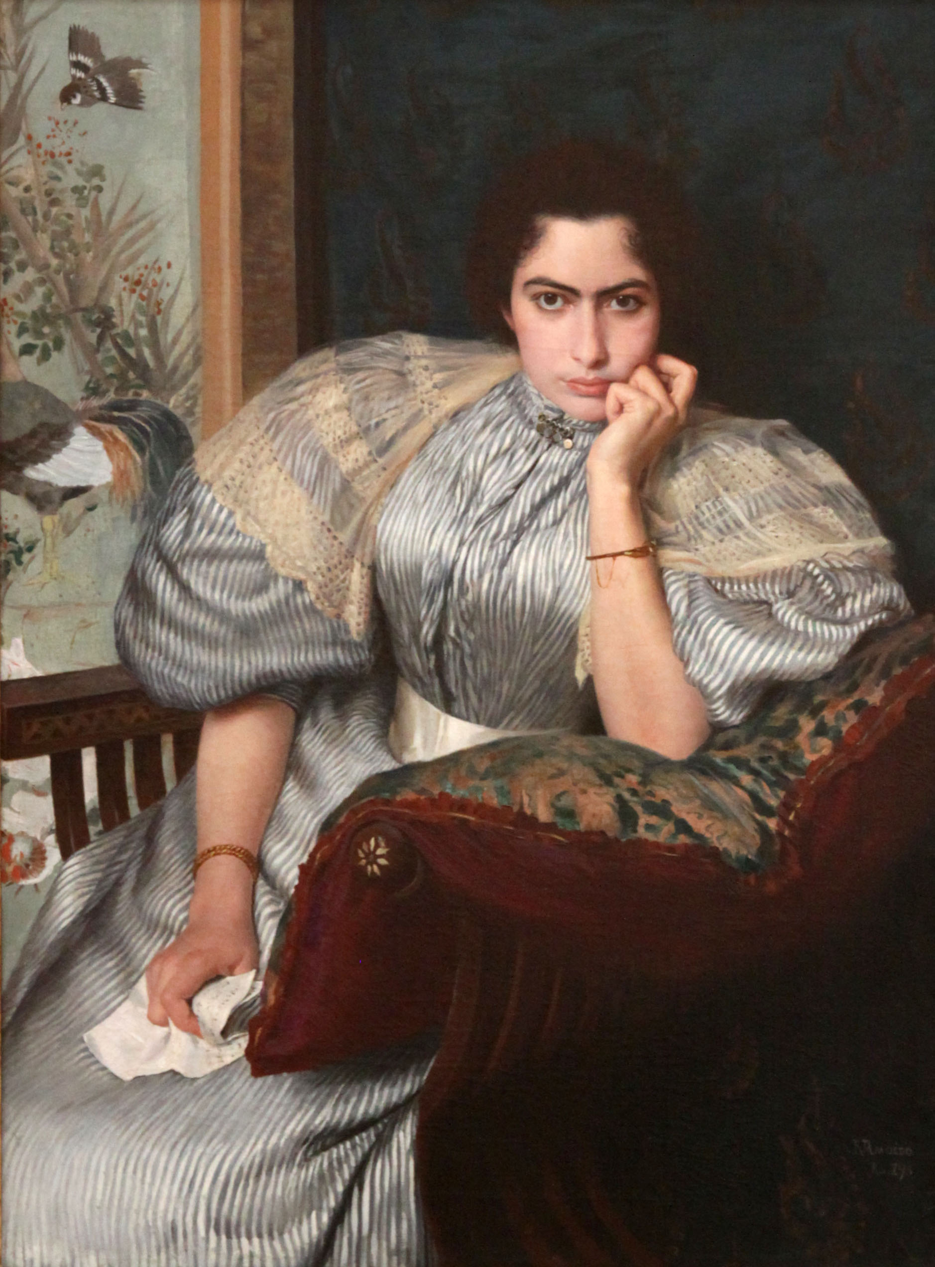 Museu Nacional de Belas Artes - Rio de Janeiro - Rodolfo Amoedo - Más Notícias - 1895 - óleo sobre tela - 100 x 74 cm - Assinada: R Amoêdo Rio 895 - compra: 1895